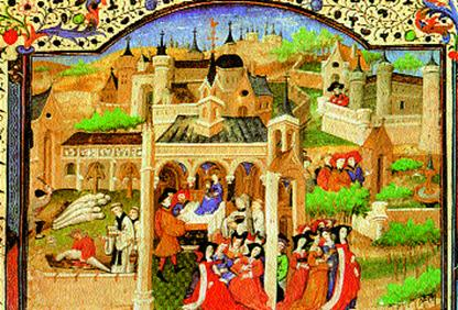 Decameron. Plague. Paris, Bibliothèque Nationale de France, MS fr. 239, s. xv ¼, f. 1r